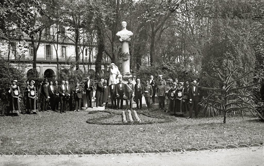 Título original: Homenaje a Usandizaga en la plaza de Gipuzkoa (2/5) Localización: San Sebastián (Guipúzcoa)